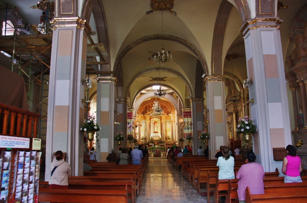 Catedral de la Purísima Concepción, Celaya, Guanajuato, México